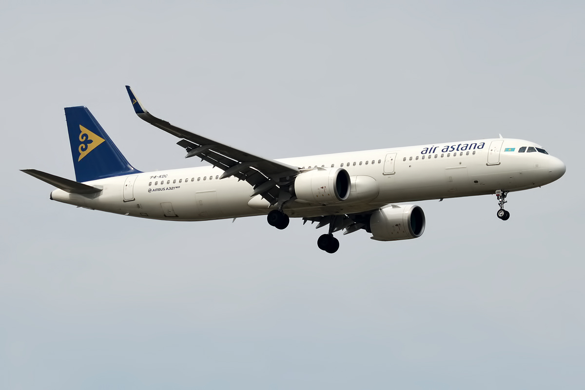 Air Astana, P4-KDC, Airbus A321-271N